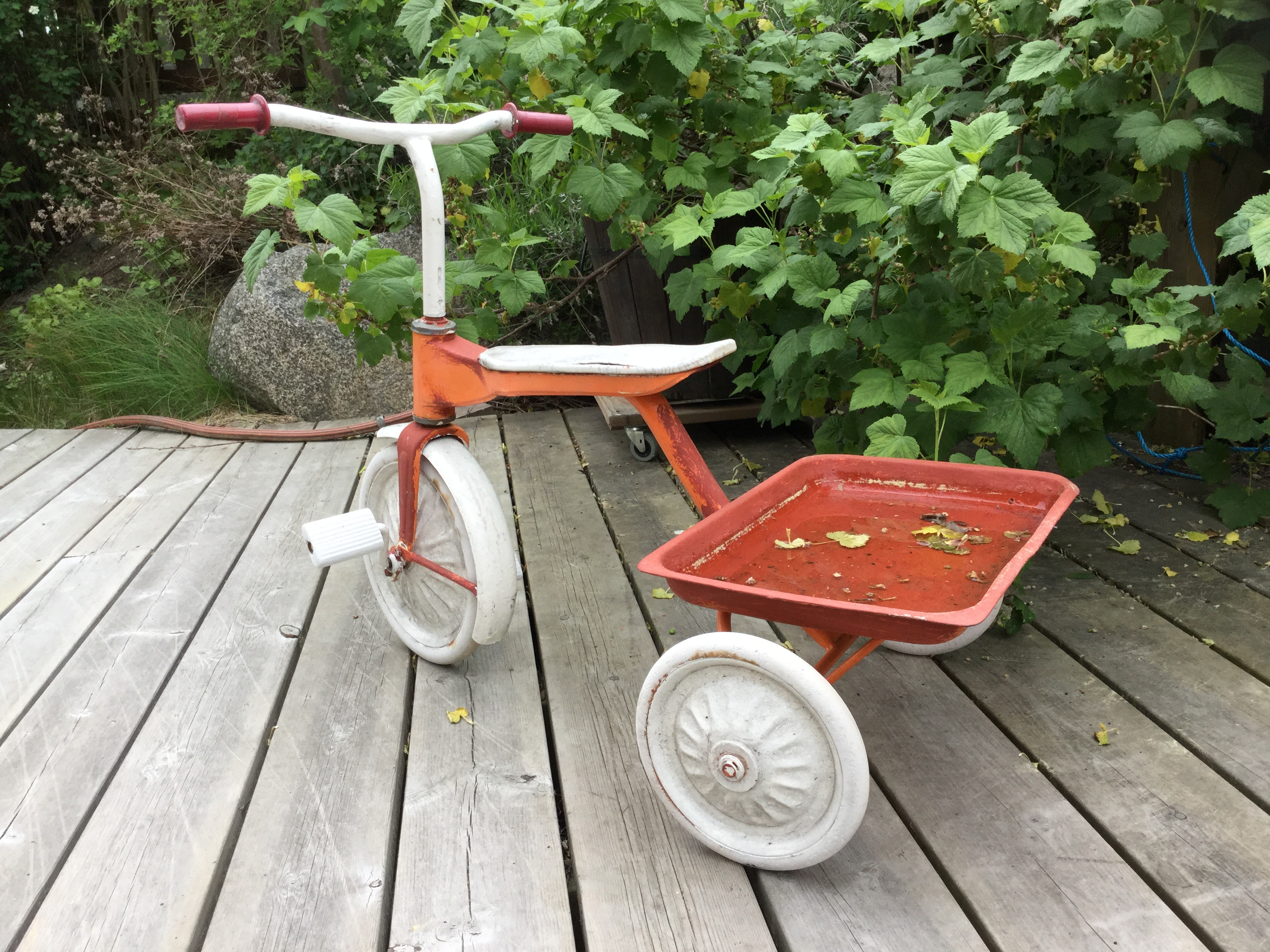 Trehjuling från sjuttiotalet